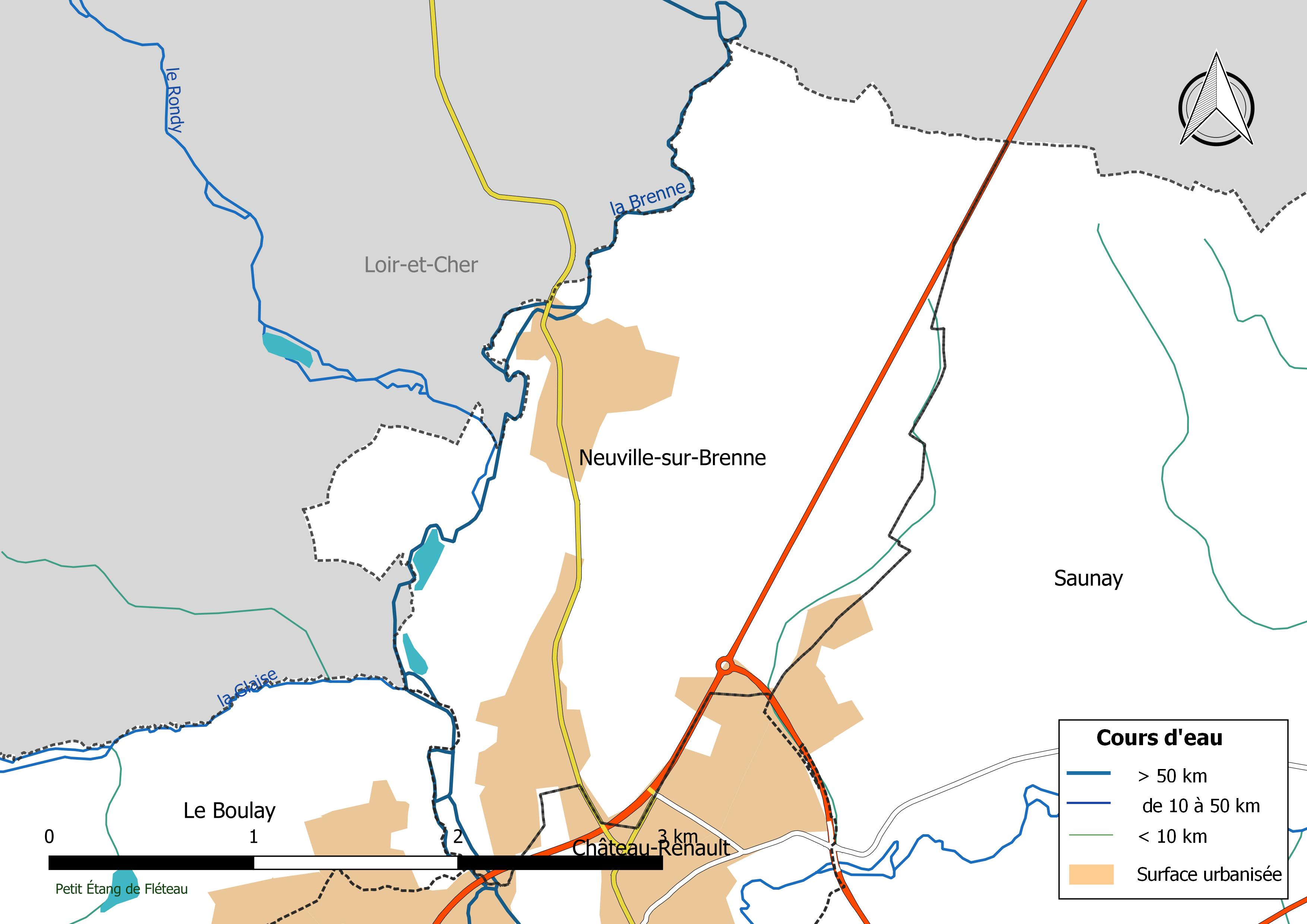 Carte du réseau hydrographique de la commune de Neuville-sur-Brenne (France).